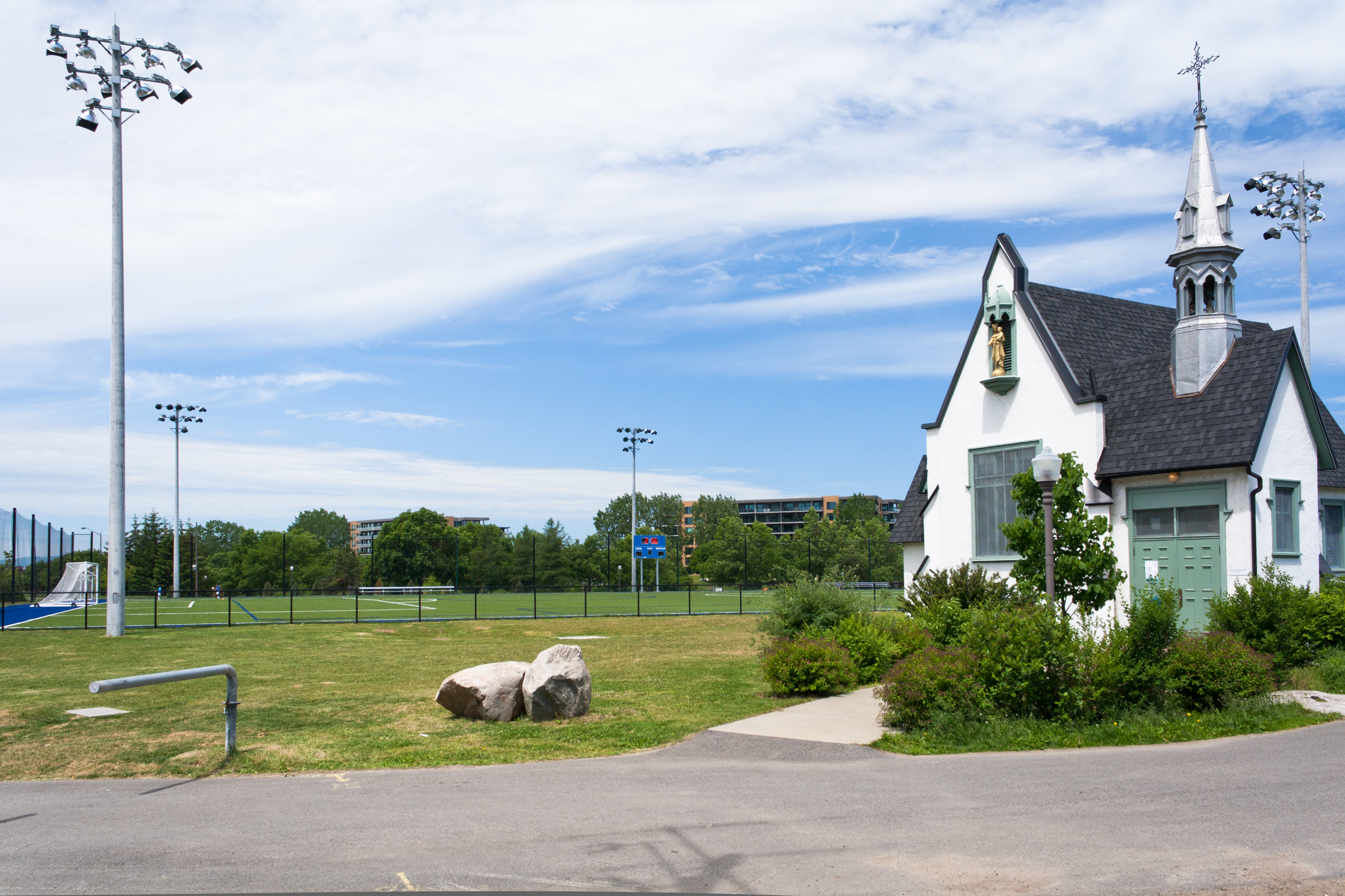 Image de la ville de Québec provenant du concours Wikipédia prend Québec.